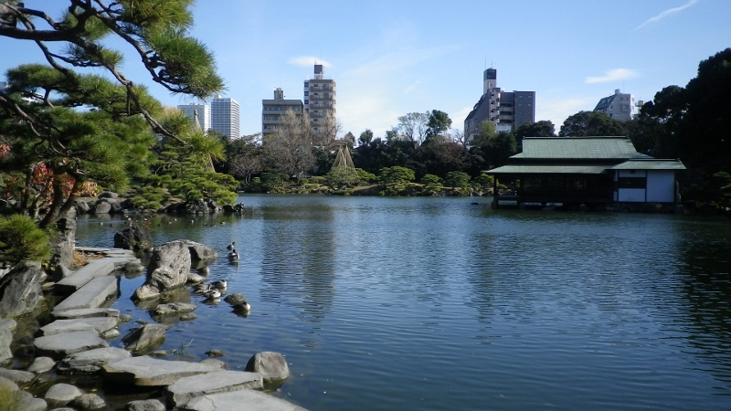 清澄庭園